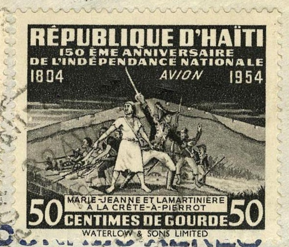 Timbre poste d'Haïti de 1954